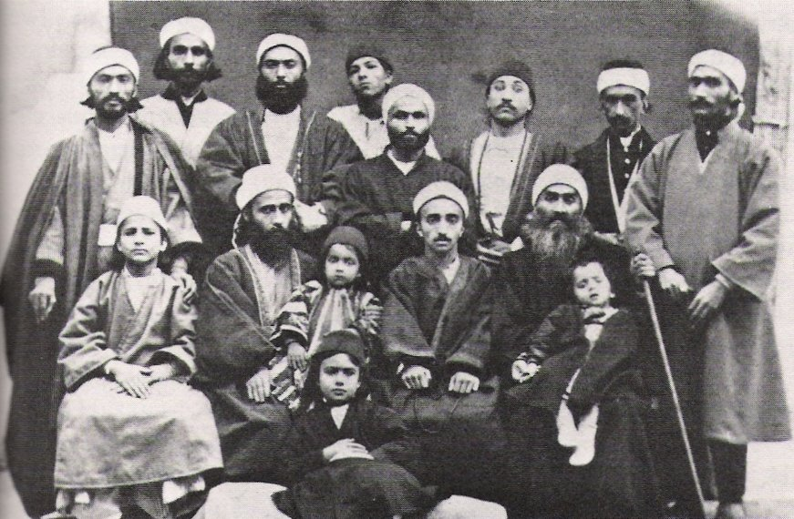 Photographie de membres de la famille et de compagnons de Bahá'u'lláh à Andrinople vers 1868 : (assis de gauche à droite) : probablement Díyá'u'lláh (demi-frère de 'Abdu'l-Bahá), Mírzá Muḥammad-Qulí (demi-frère de Bahá'u'lláh), Mírzá Muḥammad-'Alí (demi-frère de 'Abdu'l-Bahá), Mírzá Musá Áqá-i-Kalím (frère de Bahá'u'lláh). debout : Mírzá Áqá Ján Khádimu'lláh derrière Mírzá Muḥammad-'Alí.